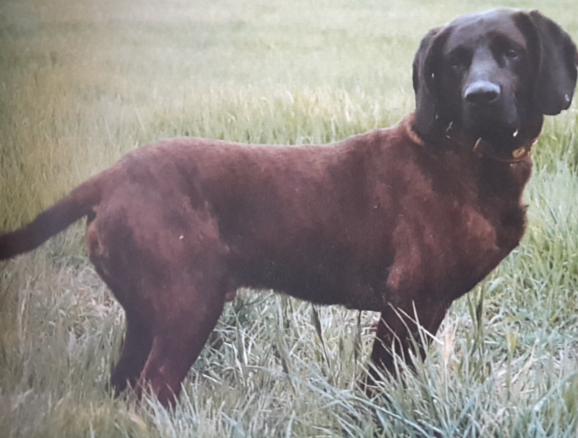 A lavoro